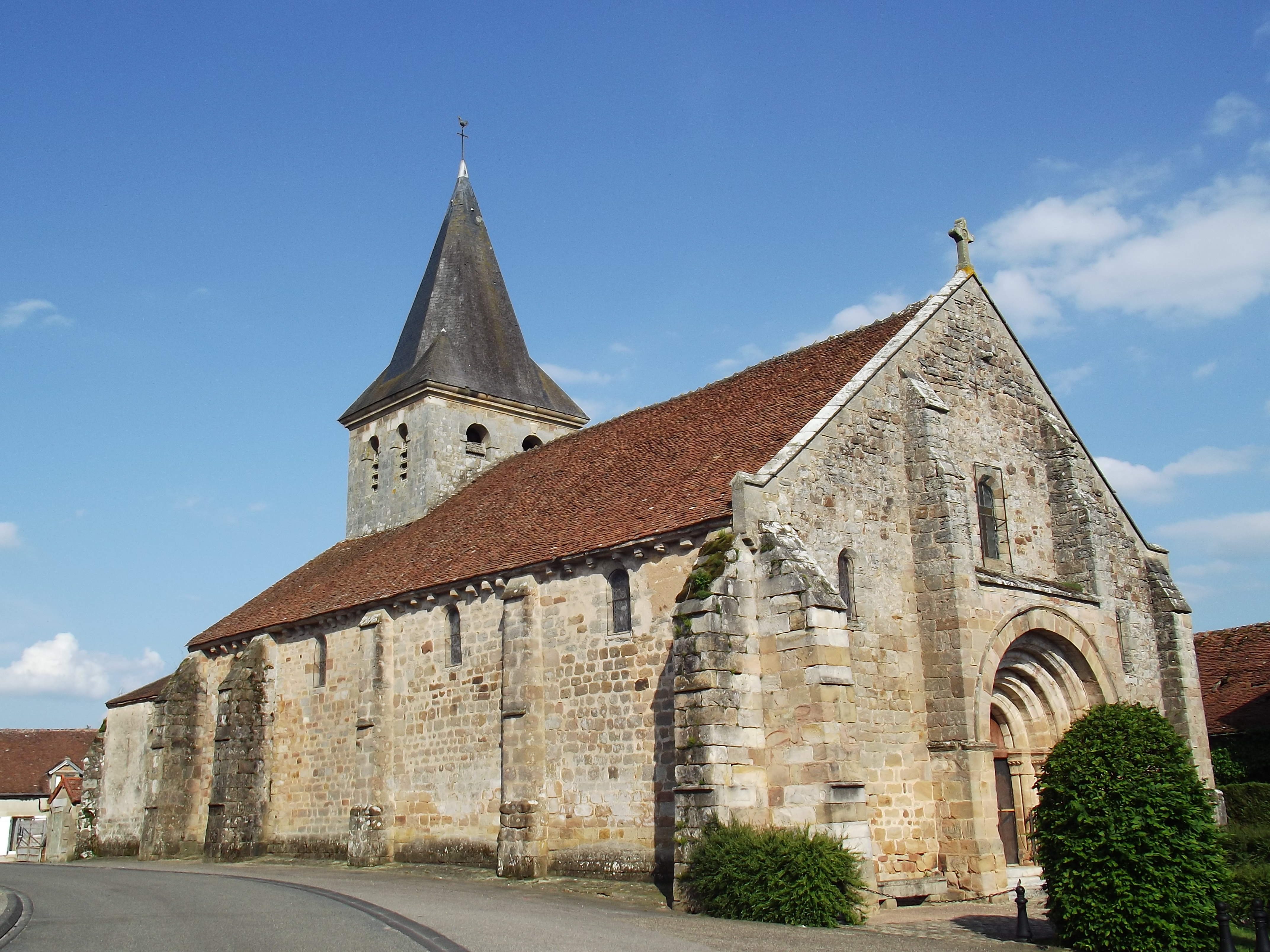 Église Saint-Plaçide sous le soleil